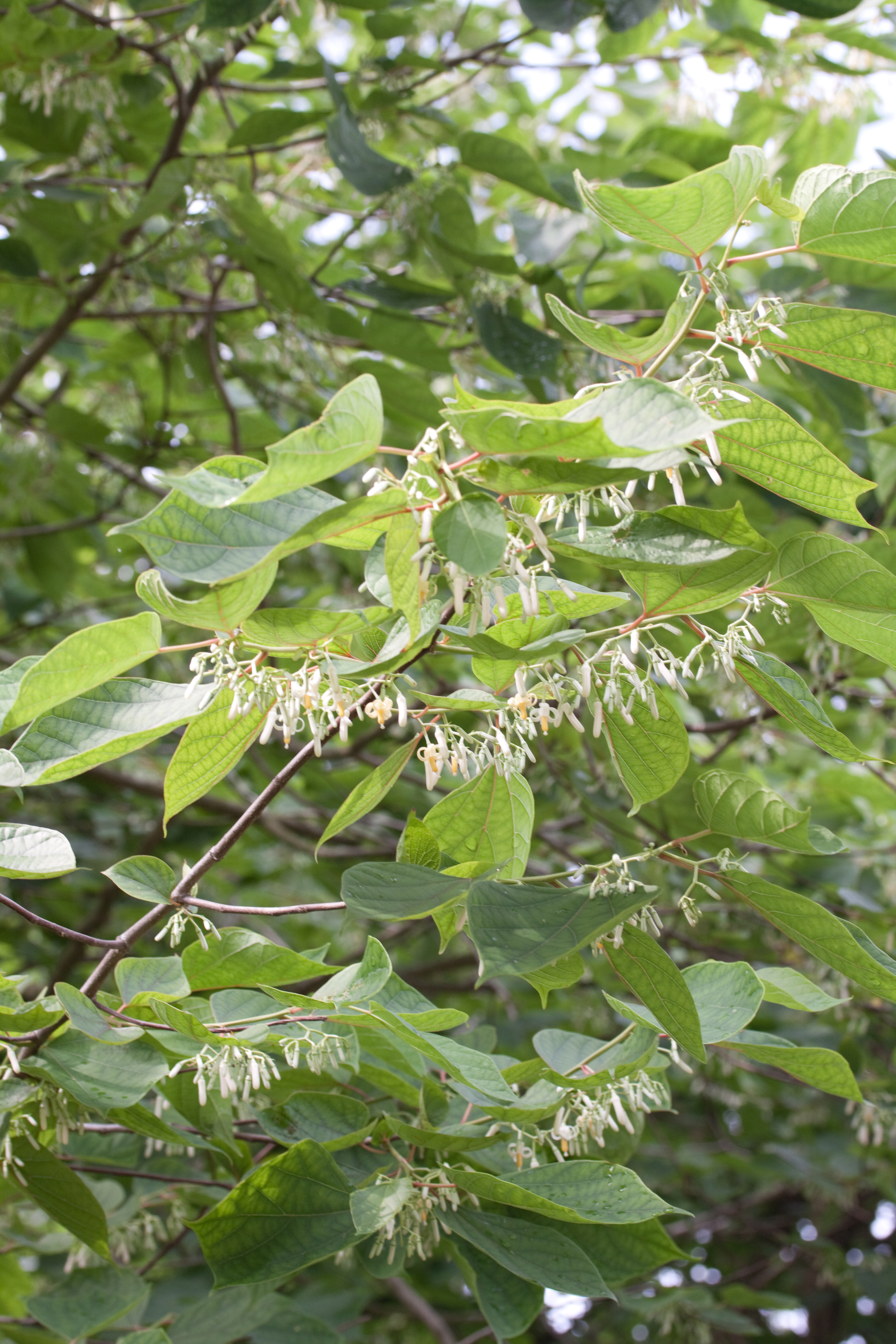 Floraison d'Alangium chinense - Jardin botanique de Strasbourg - France